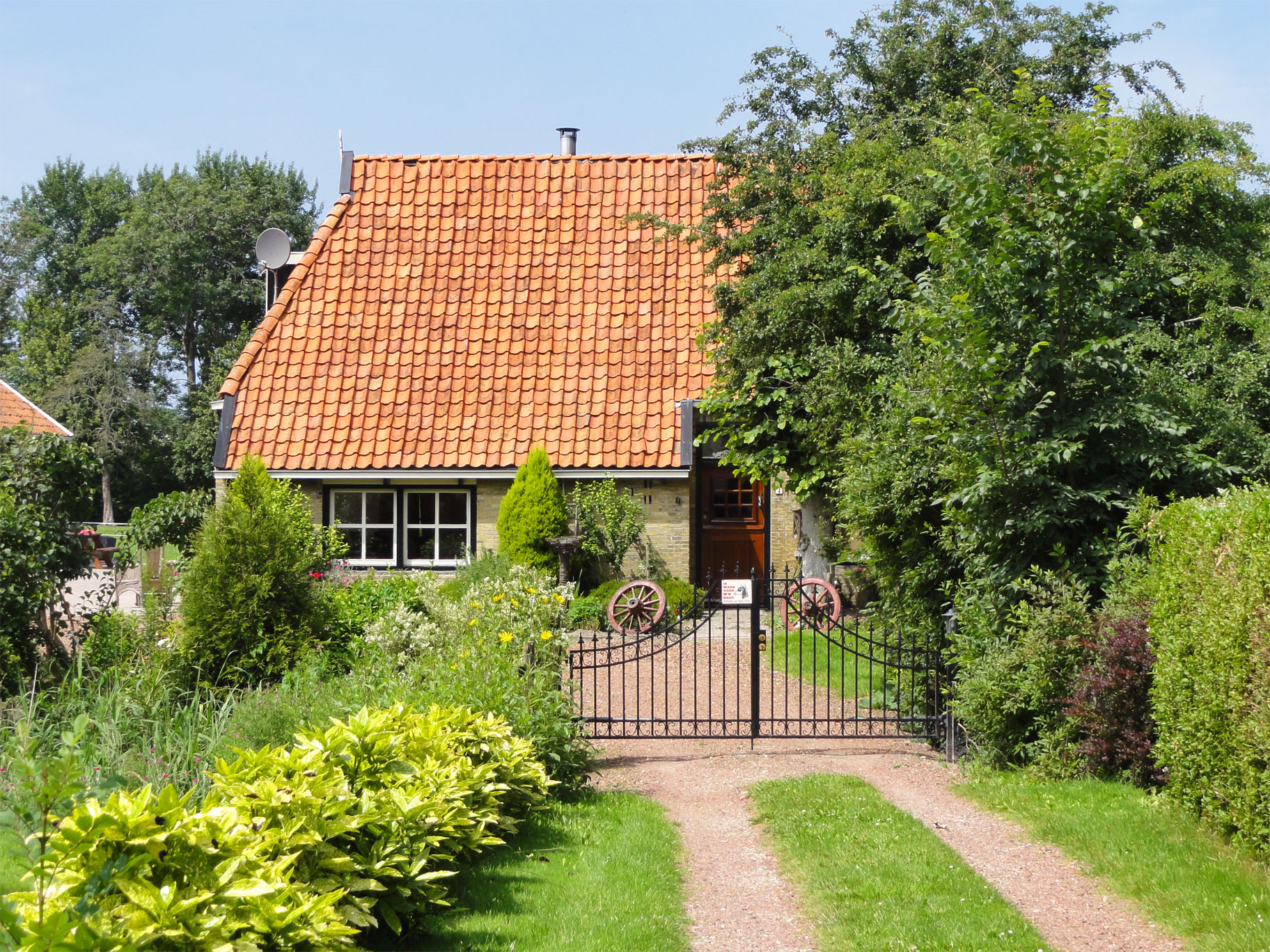 Daglonershuisje op terrein voormalige Liauckemastate